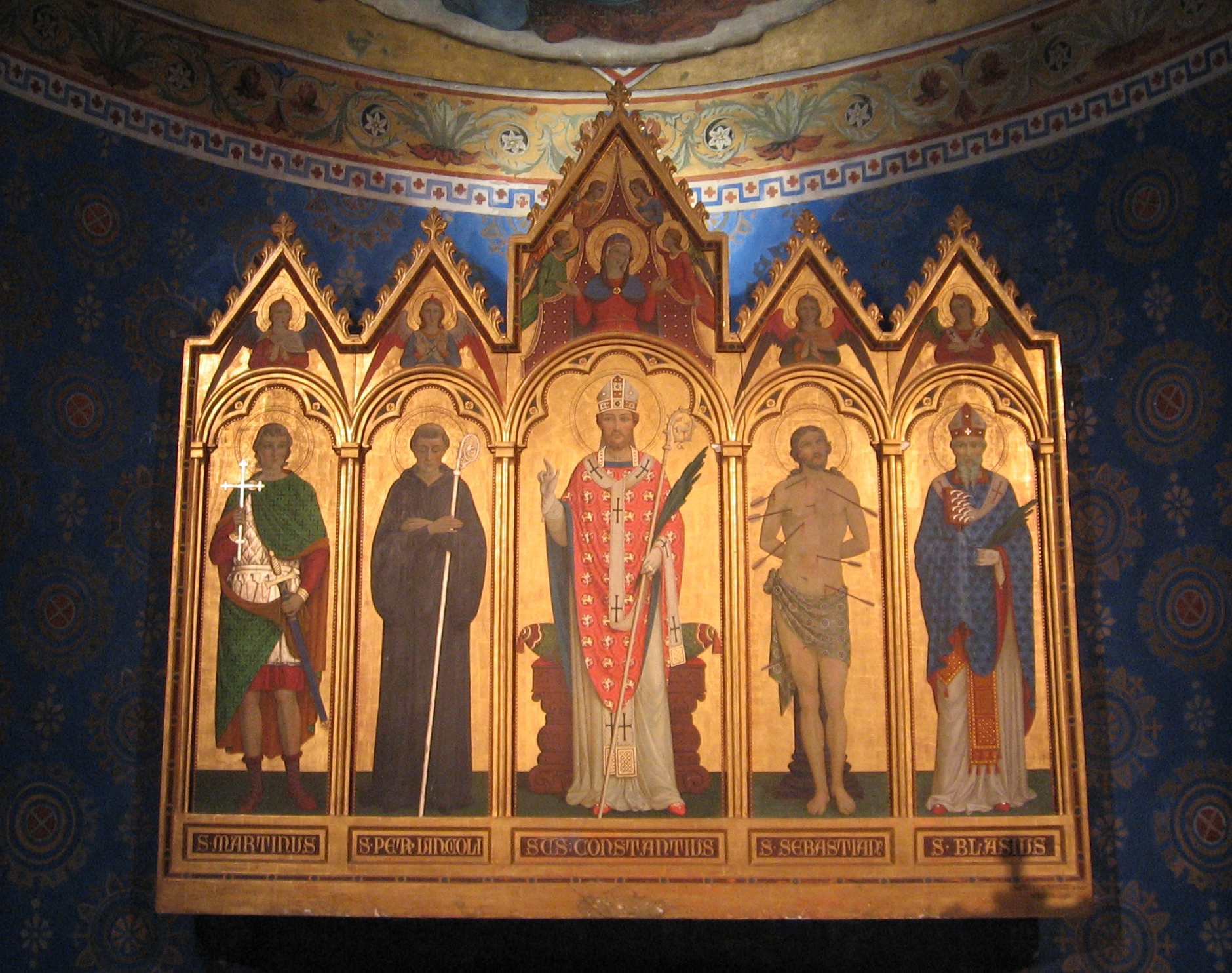 Chiesa di San Costanzo a Perugia - Polittico d'altare